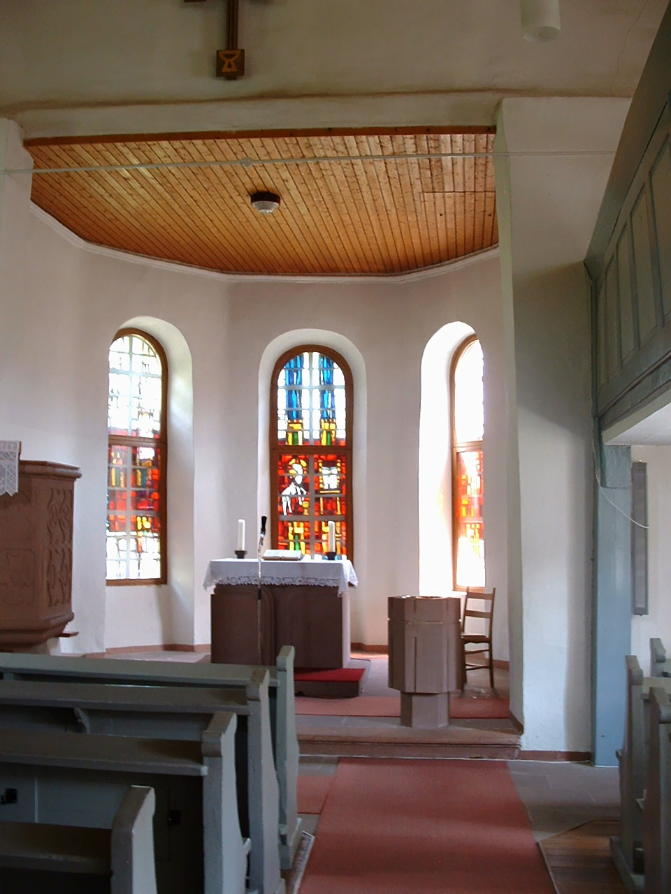 Evangelische Kirche Burgen (Hunsrück), Innen